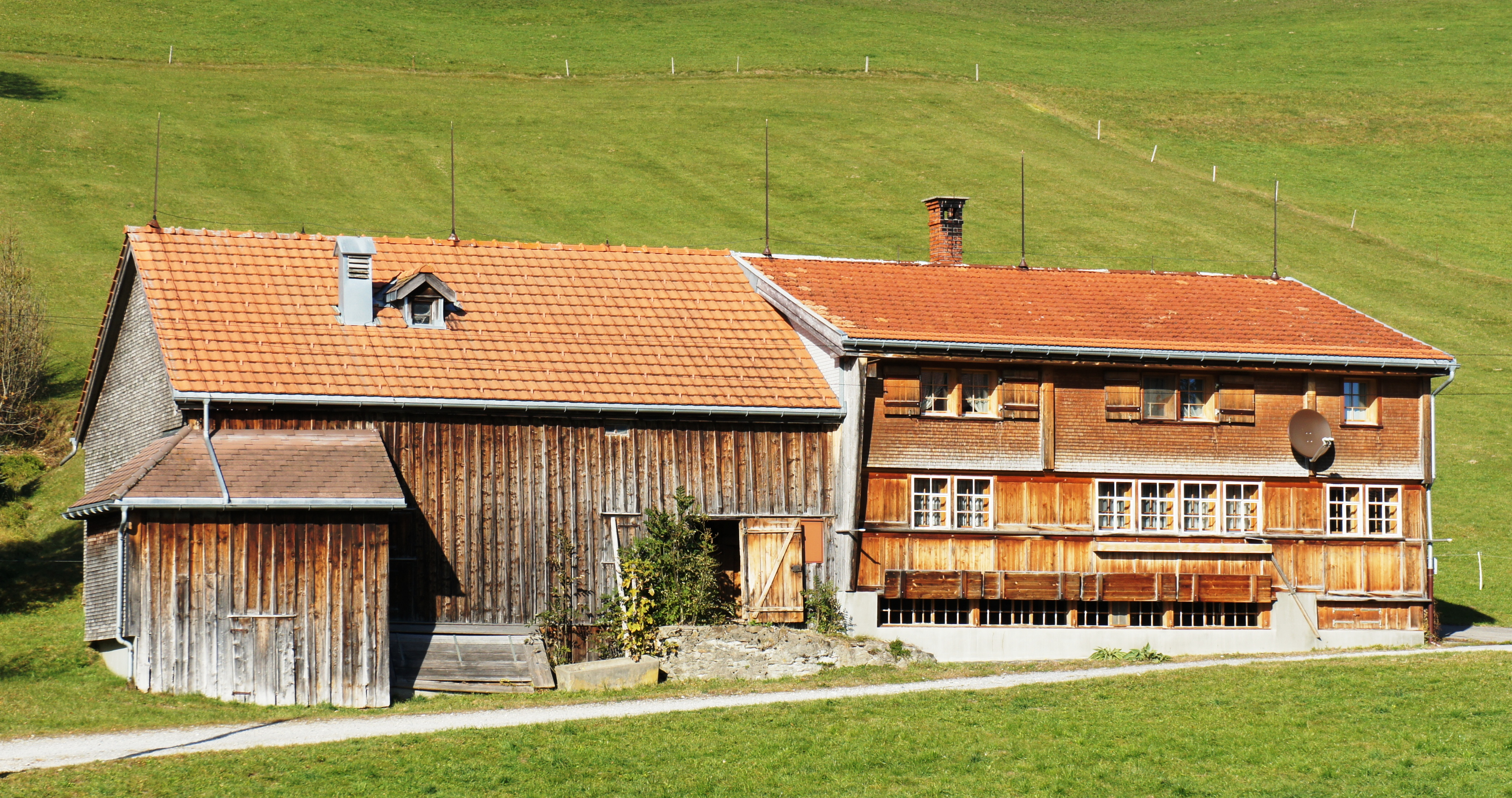 Blick von Süden auf das Heidenhaus im Ballmoos in Gais. Rechts das Wohnhaus mit zur Hauptfront abgeflachtem Dach. Rechts die mit gleicher Ausrichtung, aber steilerem Dach, angebaute Scheune.